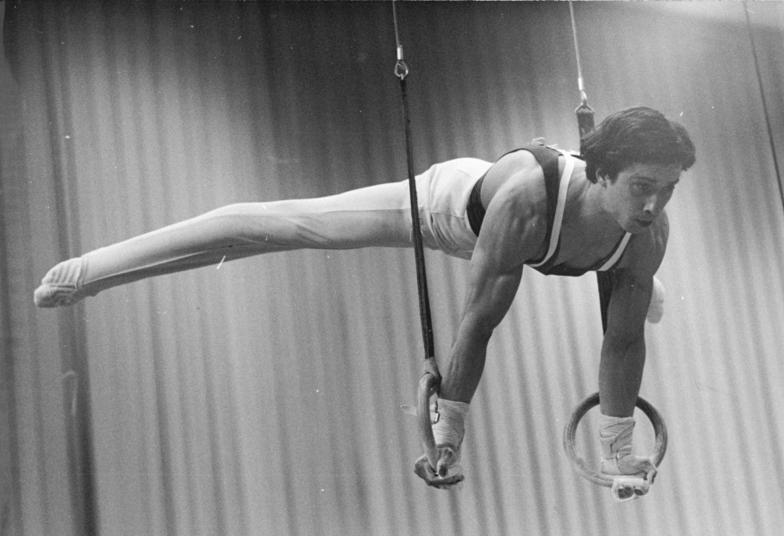 Lutz Hoffmann ADN-ZB Mittelstädt 22.5.80 Berlin: 32. DDR-Meisterschaften im Turnen -Nach Absolvierung der ersten Kür am 21.5. liegt der Berliner Dynamo-Turner Lutz Hoffmann mit 111,525 Punkten hinter seinem Klubkameraden Roland Brückner auf dem zweiten Rang. Der 21jährige Lutz Hoffmann - hier bei seiner Kür an den Ringen - steht damit dicht vor seiner ersten Mehrkampfmedaille.